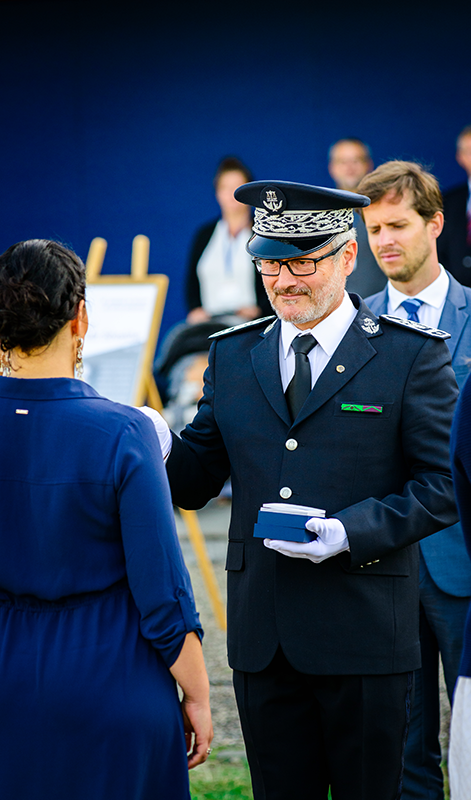 Christophe Millescamps, directeur de l'Enap